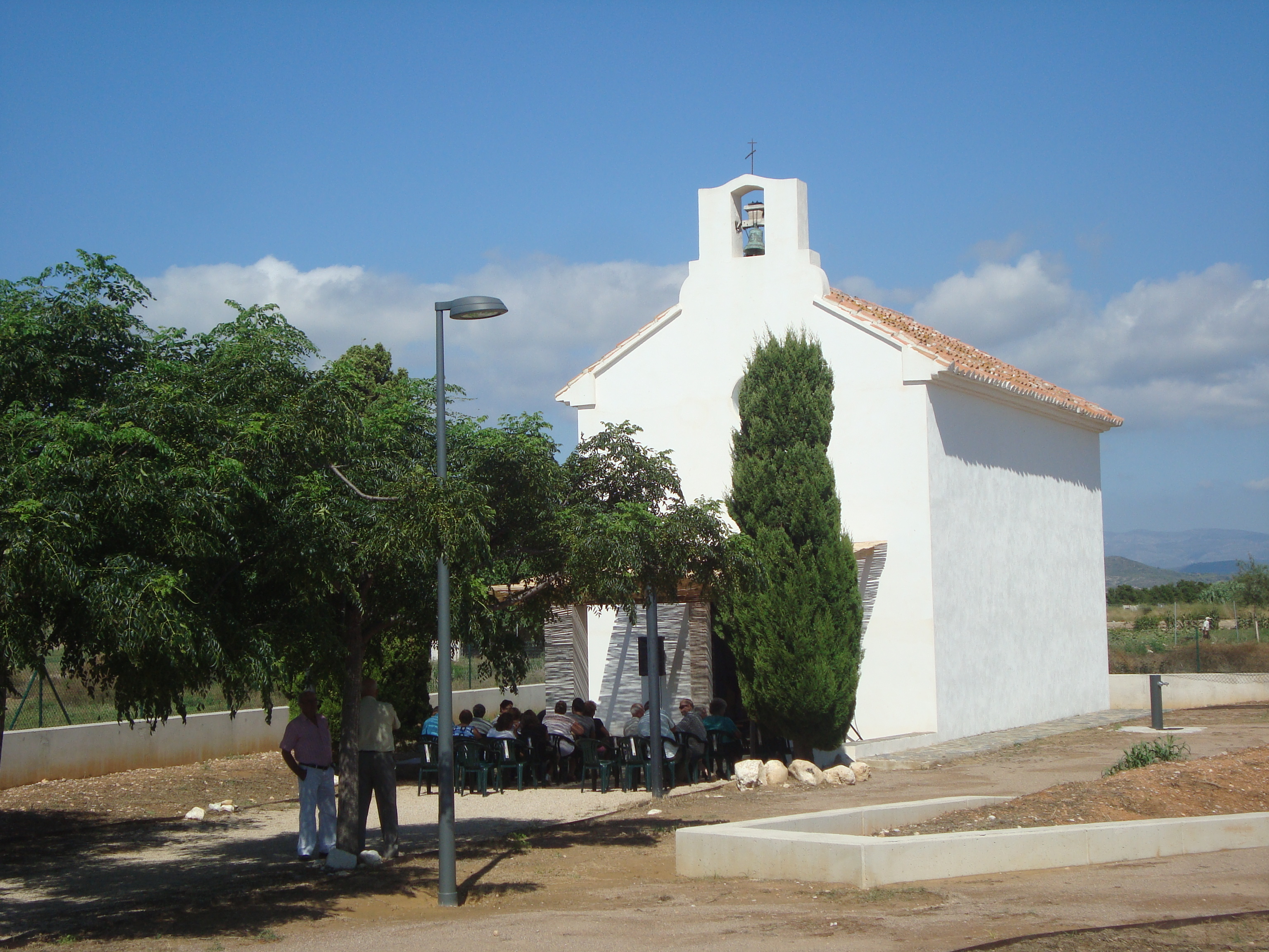 Ermita de Sant Antoni de Pàdua (Alcalà de Xivert) 03.004-009.